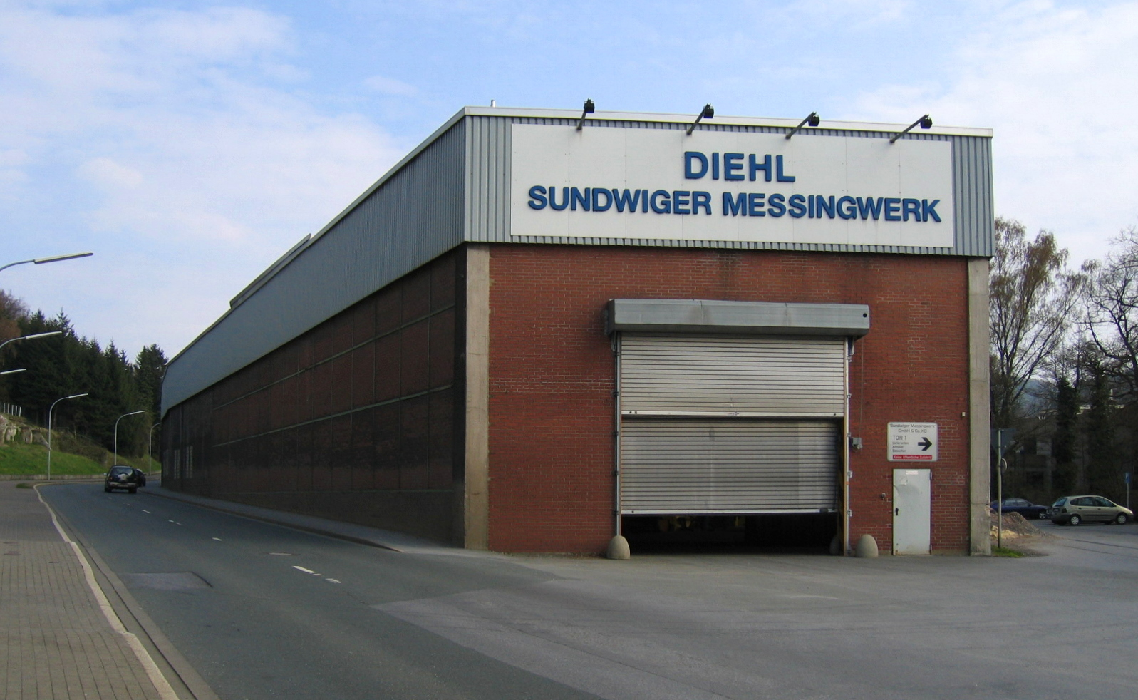 Description: Fabrikgebäude des Sundwiger Messingwerks in Hemer Source: selbst fotografiert Date: 24. Apr. 2006 Author: Bubo